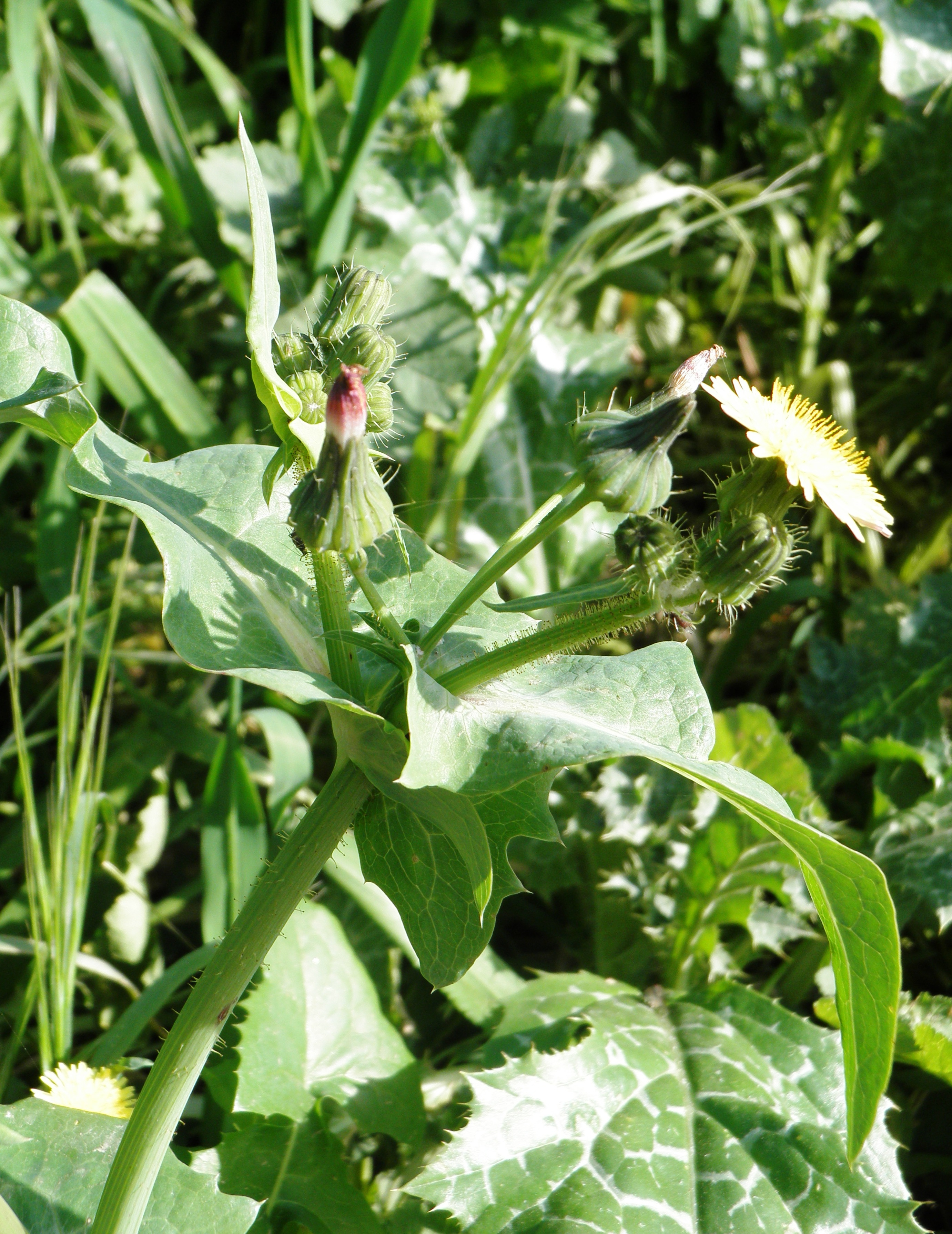 flowers אזנב מצוי